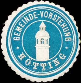 Sealing stamp Title: Gemeinde-Vorstehung Hötting Description: blau, weiß, geprägt Place: Hötting size: 4 cm